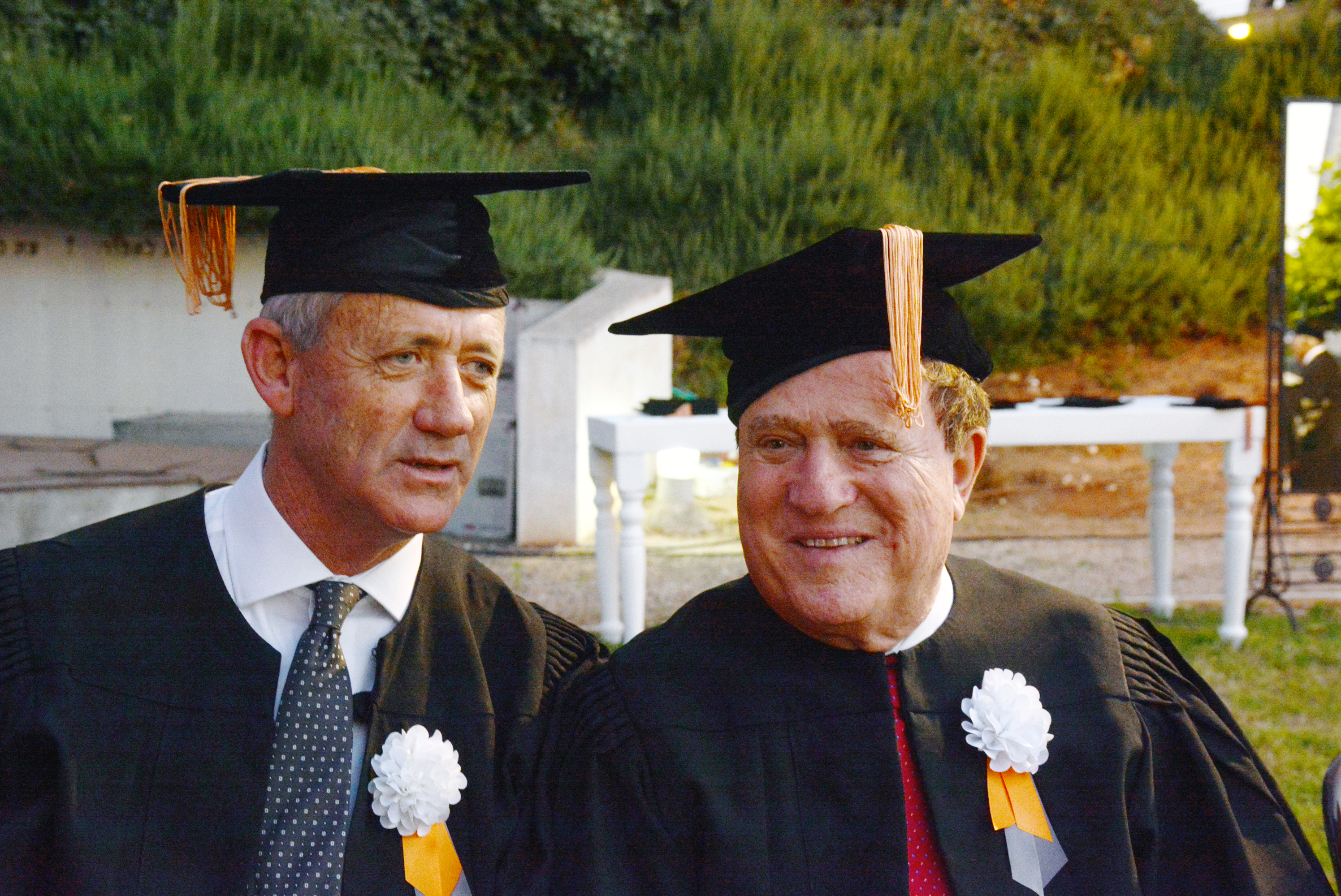 יהורם גאון ובני גנץ בעת קבלת ד"ר כבוד באוניברסיטת בר אילן